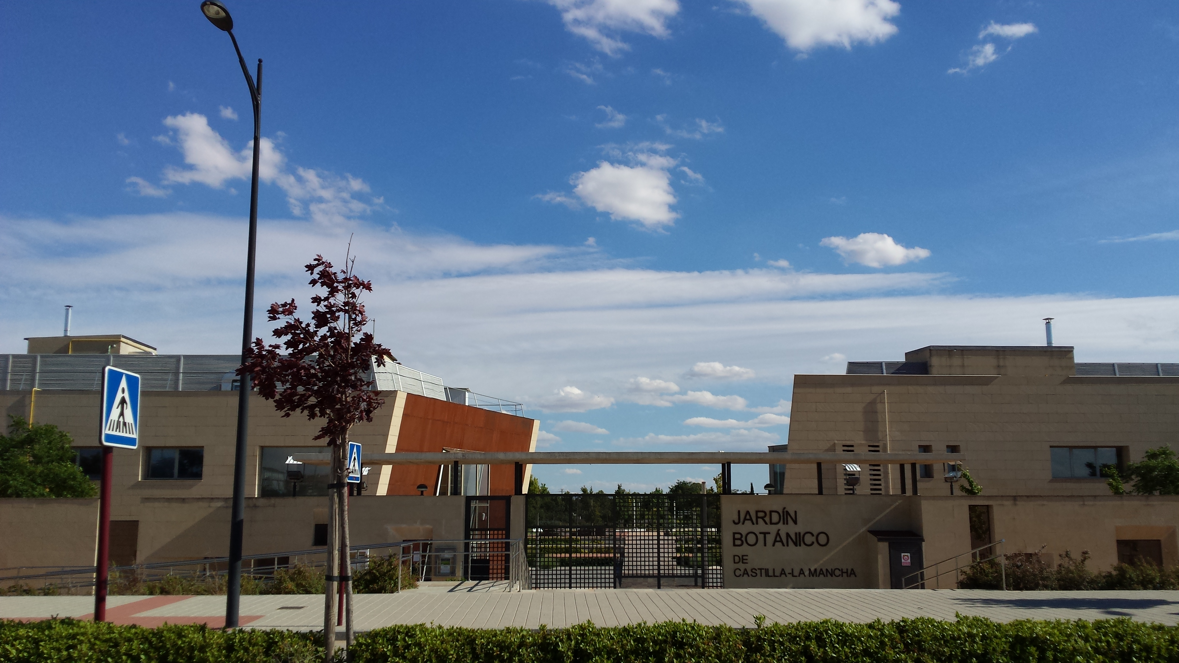 Jardín Botánico de Castilla-La Mancha (JBCLM). Instituto Botánico de Castilla-La Mancha. Albacete